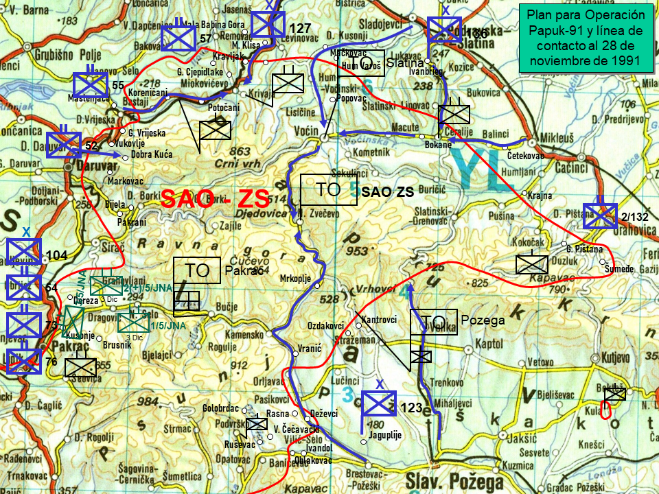 Plan Operación Papuk-91 y linea de contacto 28 Nov 91. Hecho sobre la base de Martinić Jerčić, Natko (11 de diciembre de 2014). «Oslobodilačke Operacije Hrvatskih Snaga u Zapadnoj Slavoniji u Jesen i Zimu 1991./1992. godine» [Operaciones de liberación de las fuerzas croatas en Eslavonia occidental en otoño e invierno 1991/1992.]. Tesis Doctoral (en croata) (Zagreb: University of Zagreb. Department of Croatian Studies.). Consultado el 14 de marzo de 2020.